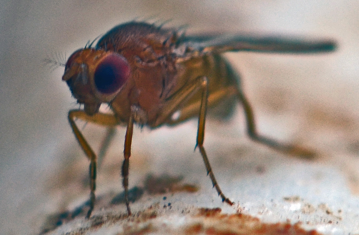 Drosophila sp., photographiées sur des fruits, sur du compost en formation, dans le nord de la France (Lille).